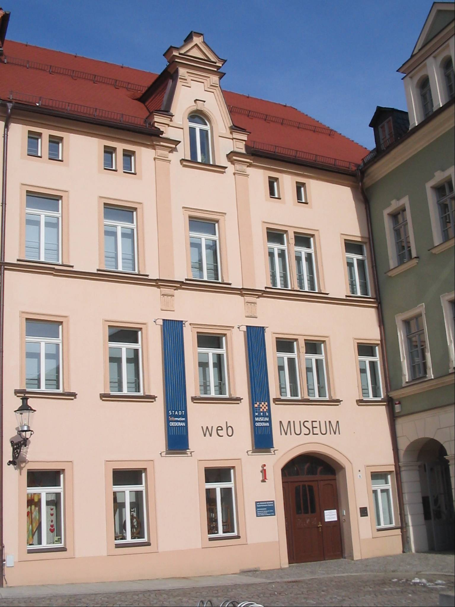 web MUSEUM OEDERAN Außenansicht